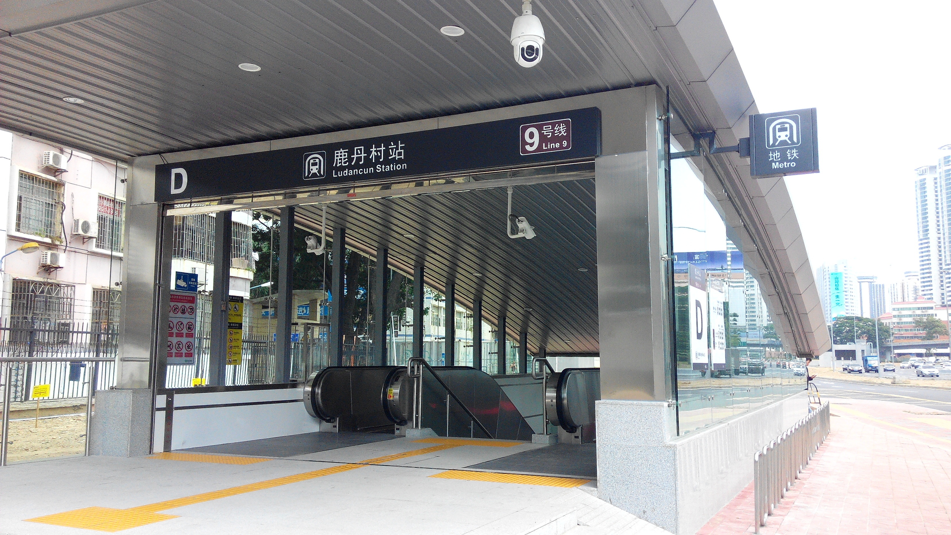 深圳地铁9号线 鹿丹村站D出口